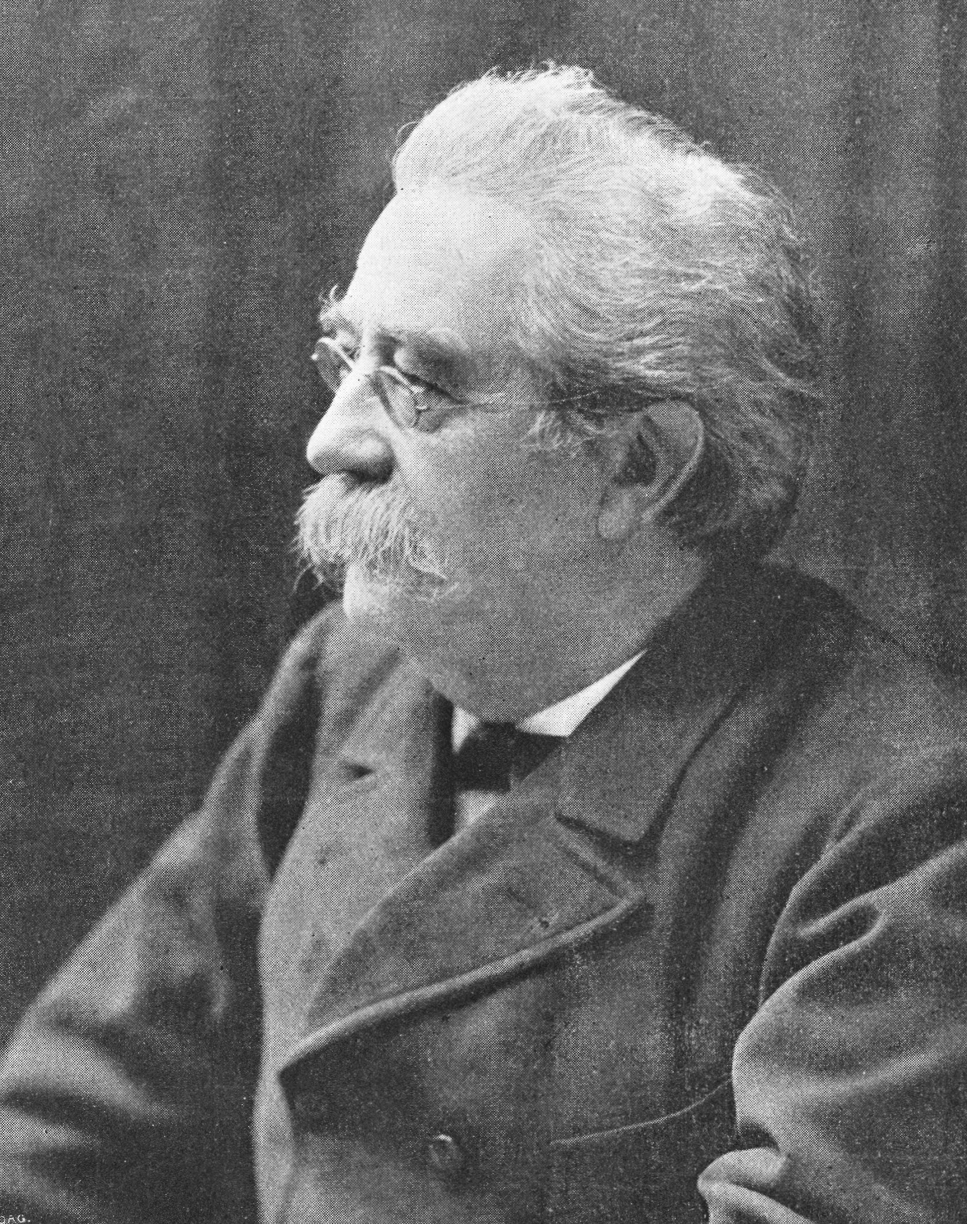 Pelle Ödman (1838-1911) på omslaget av Hvar 8 Dag 1908